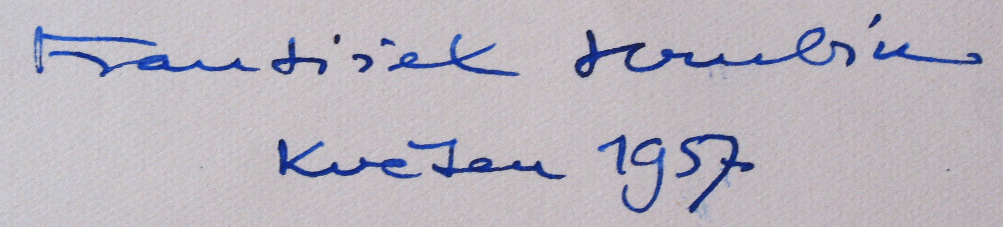 fotografie podpisu Fr. Hrubína z věnování v knize